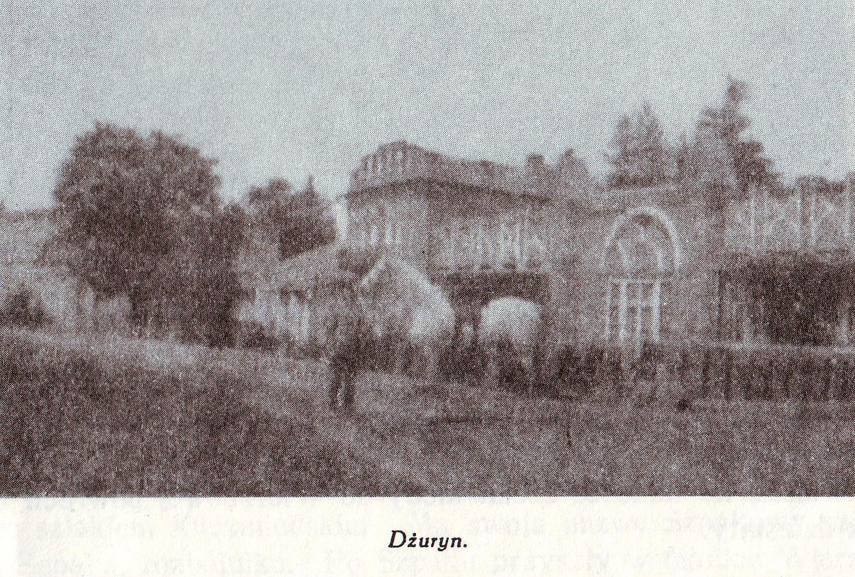 Dżuryn